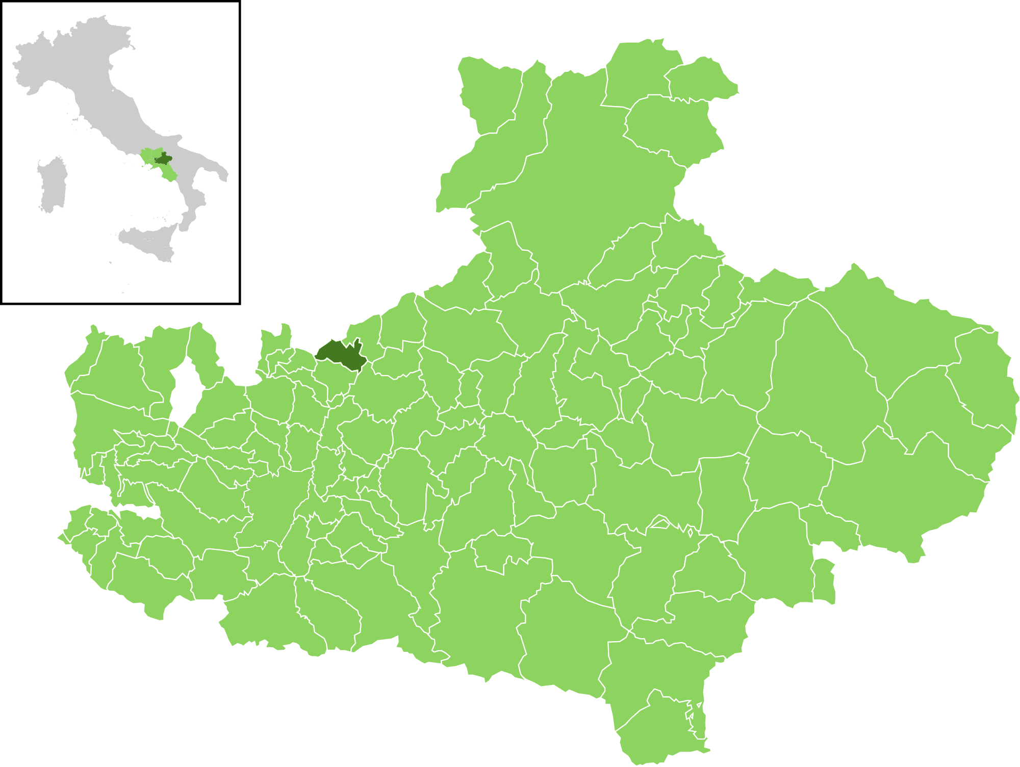 Posizione del comune all'interno della provincia di Avellino